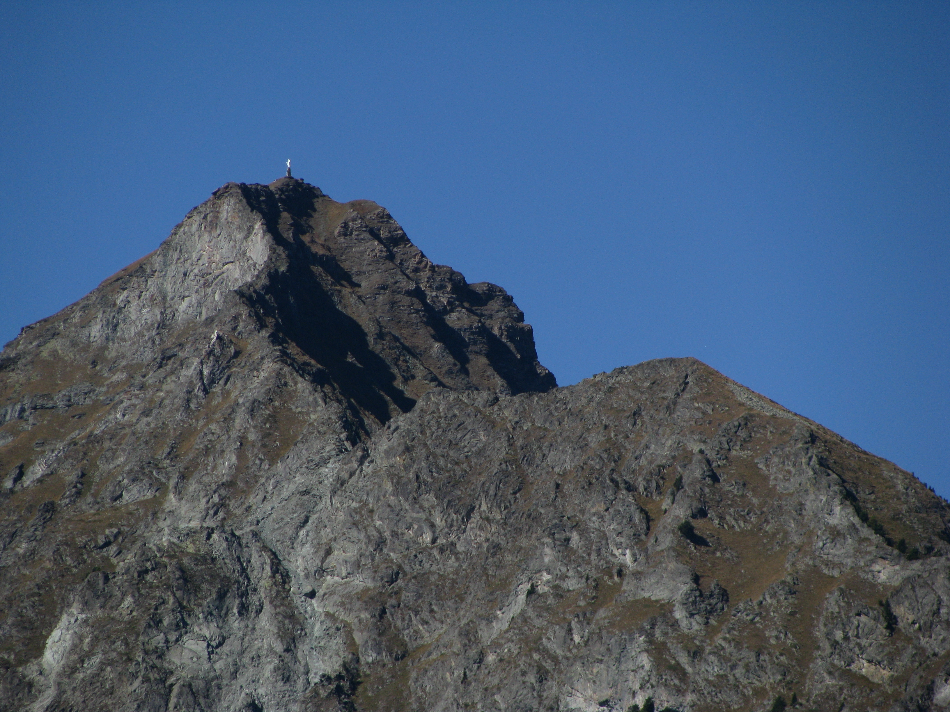 Monte Zerbion This is a photo of a monument which is part of cultural heritage of Italy.